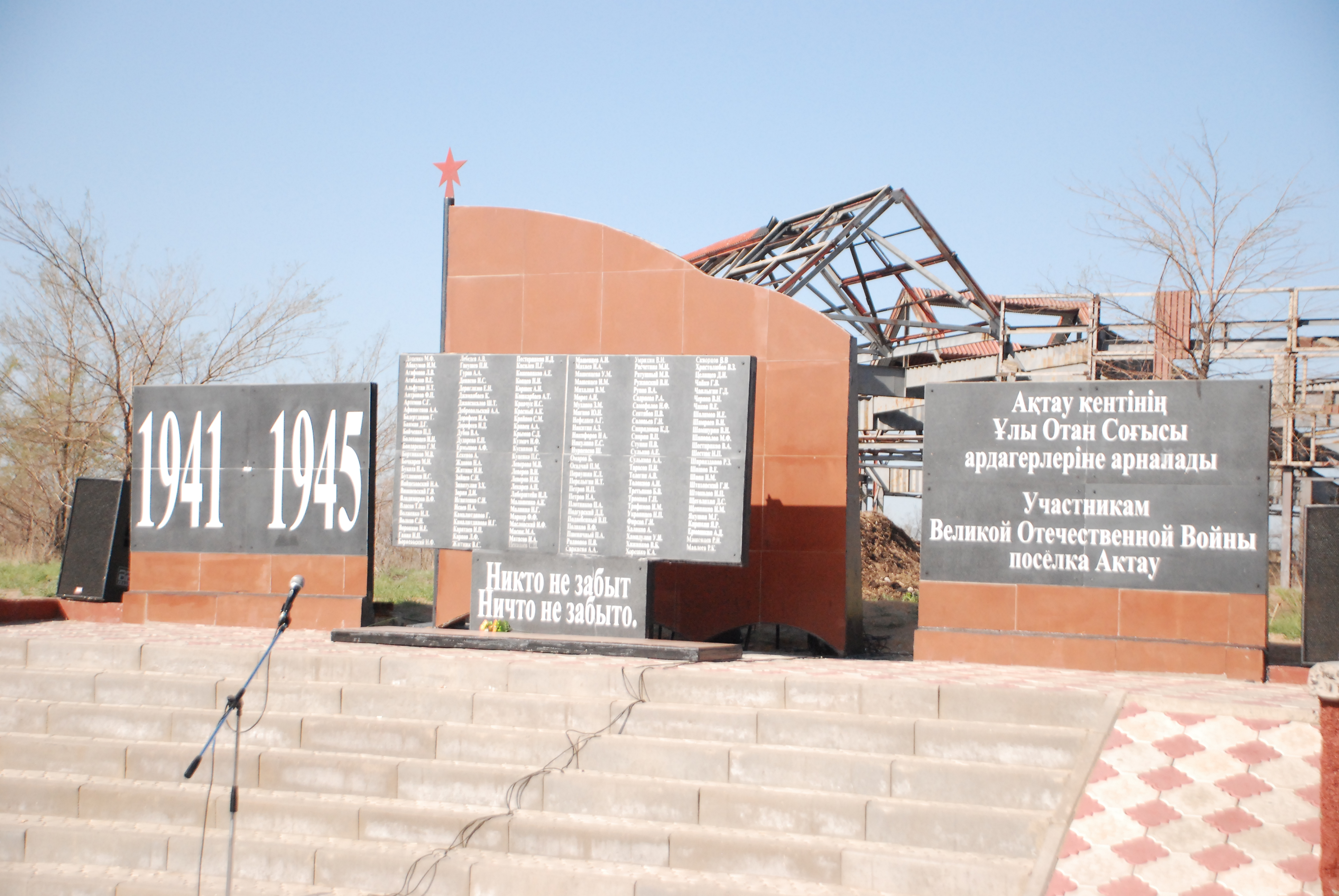 Плита памяти участникам Великой Отечественной войны, проживавшим в поселке Актау